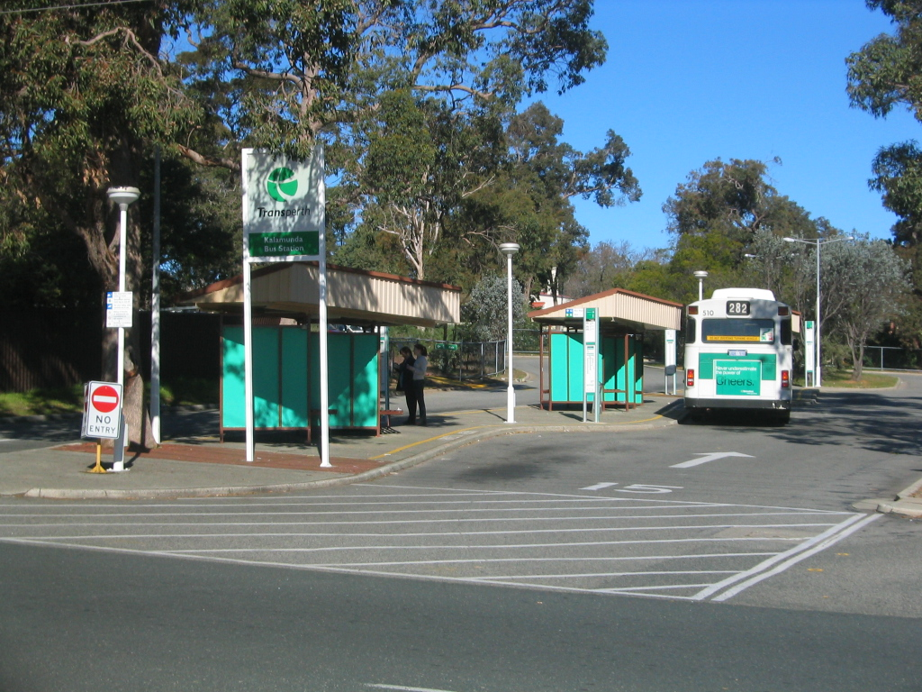 Transperth Kalamunda Bus Station